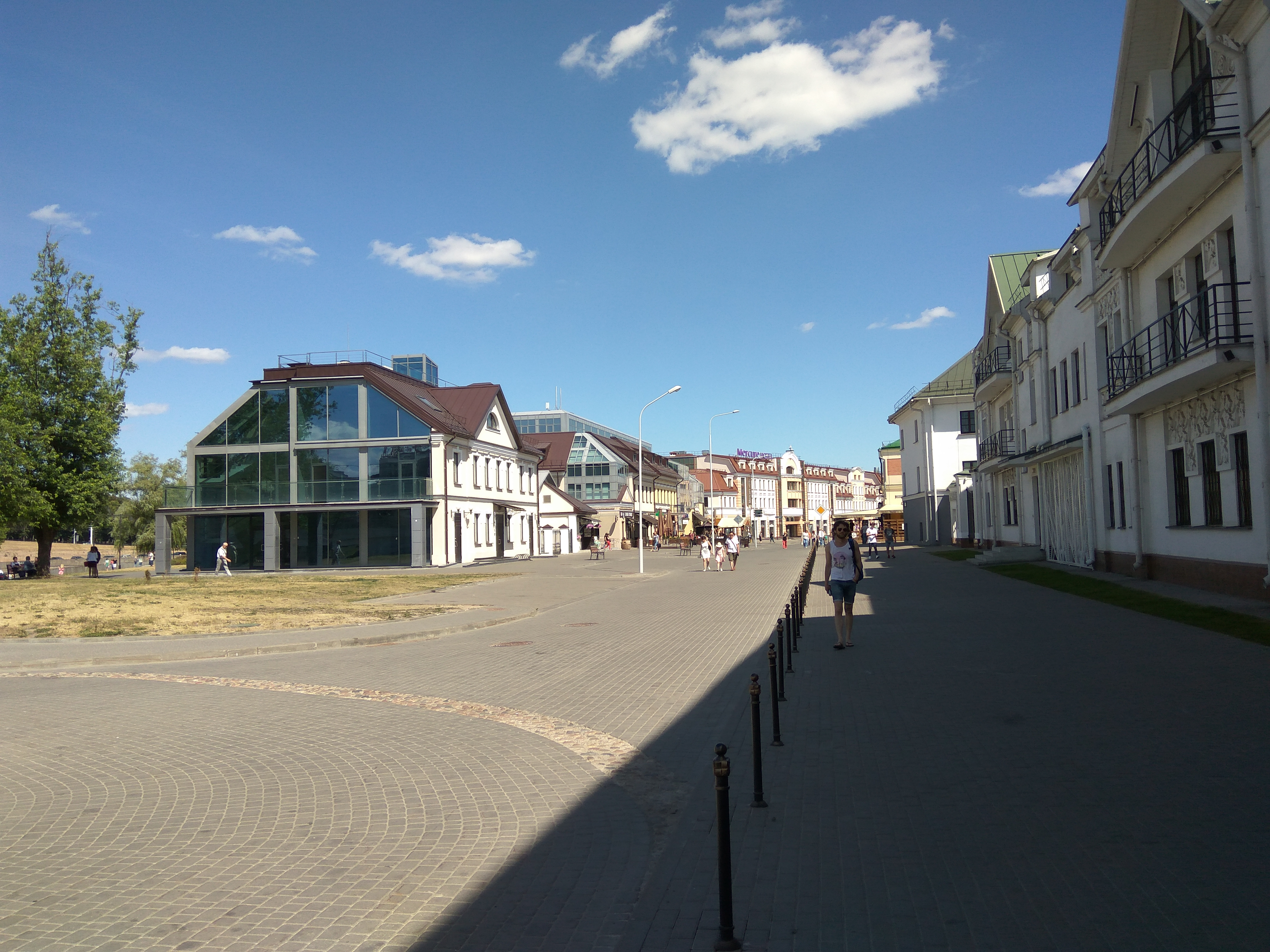 Мінск. Зыбіцкая вуліцы (2018)